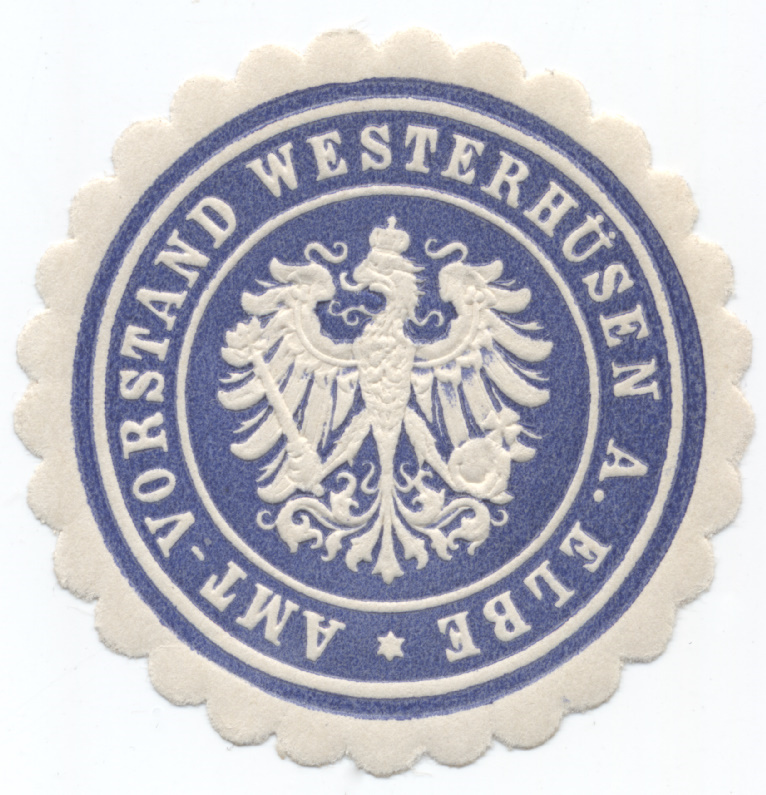 Siegelmarke des Amt-Vorstandes von Westerhüsen, Westerhüsen wurde 1910 nach Magdeburg eingemeindet